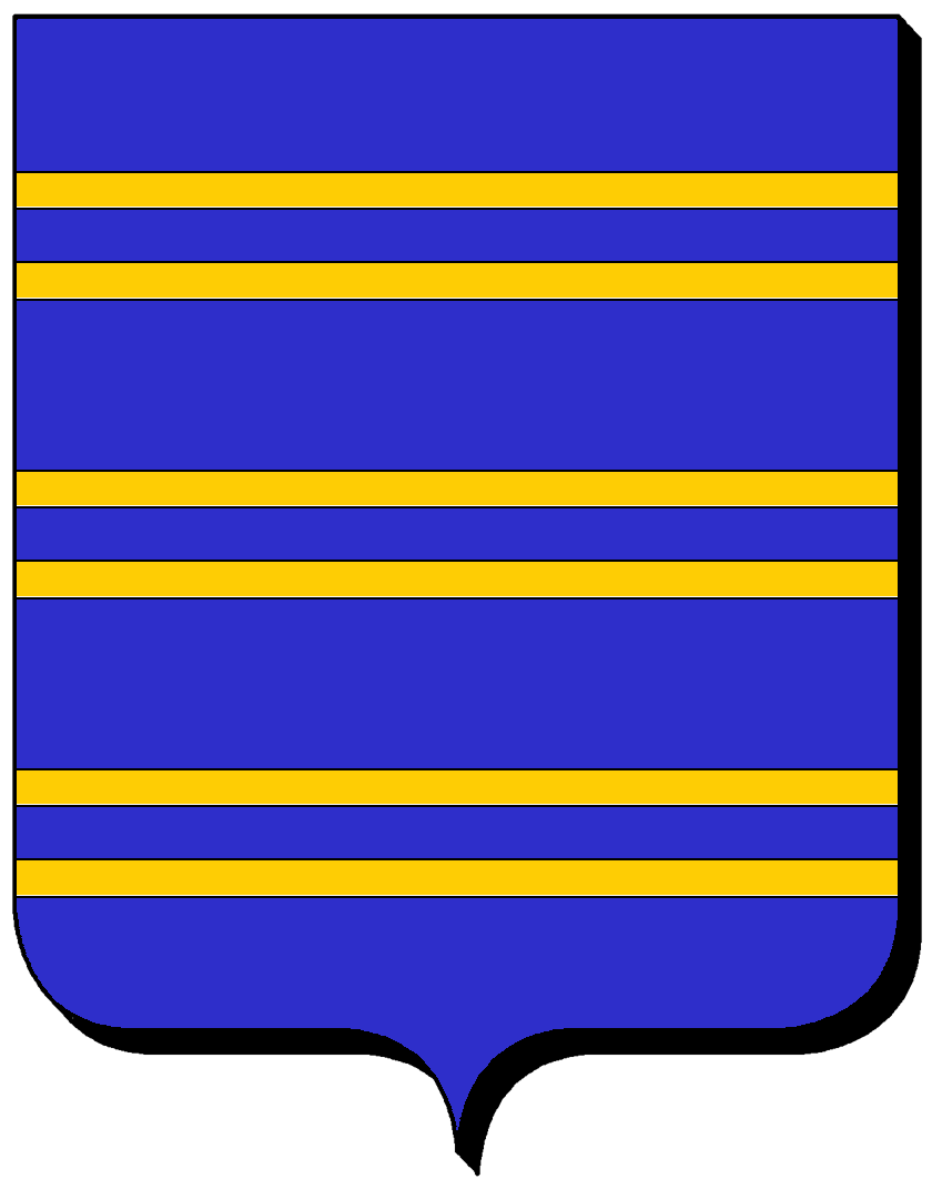 Blason de la famille de Beauffort